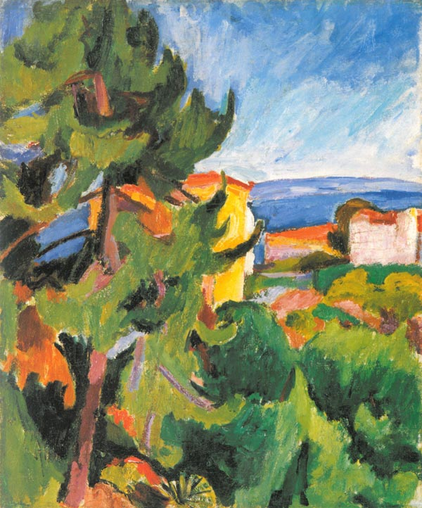 Blick auf gelbes Haus, Collioure 1908/09. Besitzer: Stadt Speyer